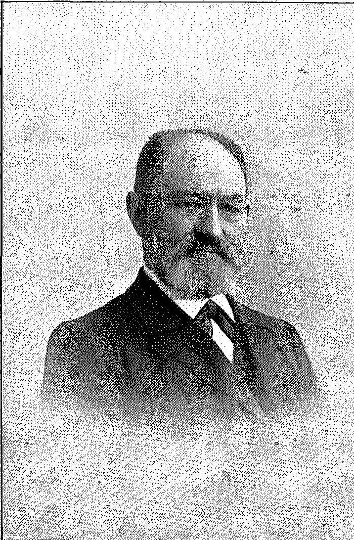 Baard Iversen (1836–1920), kjøpmann og politiker (H).